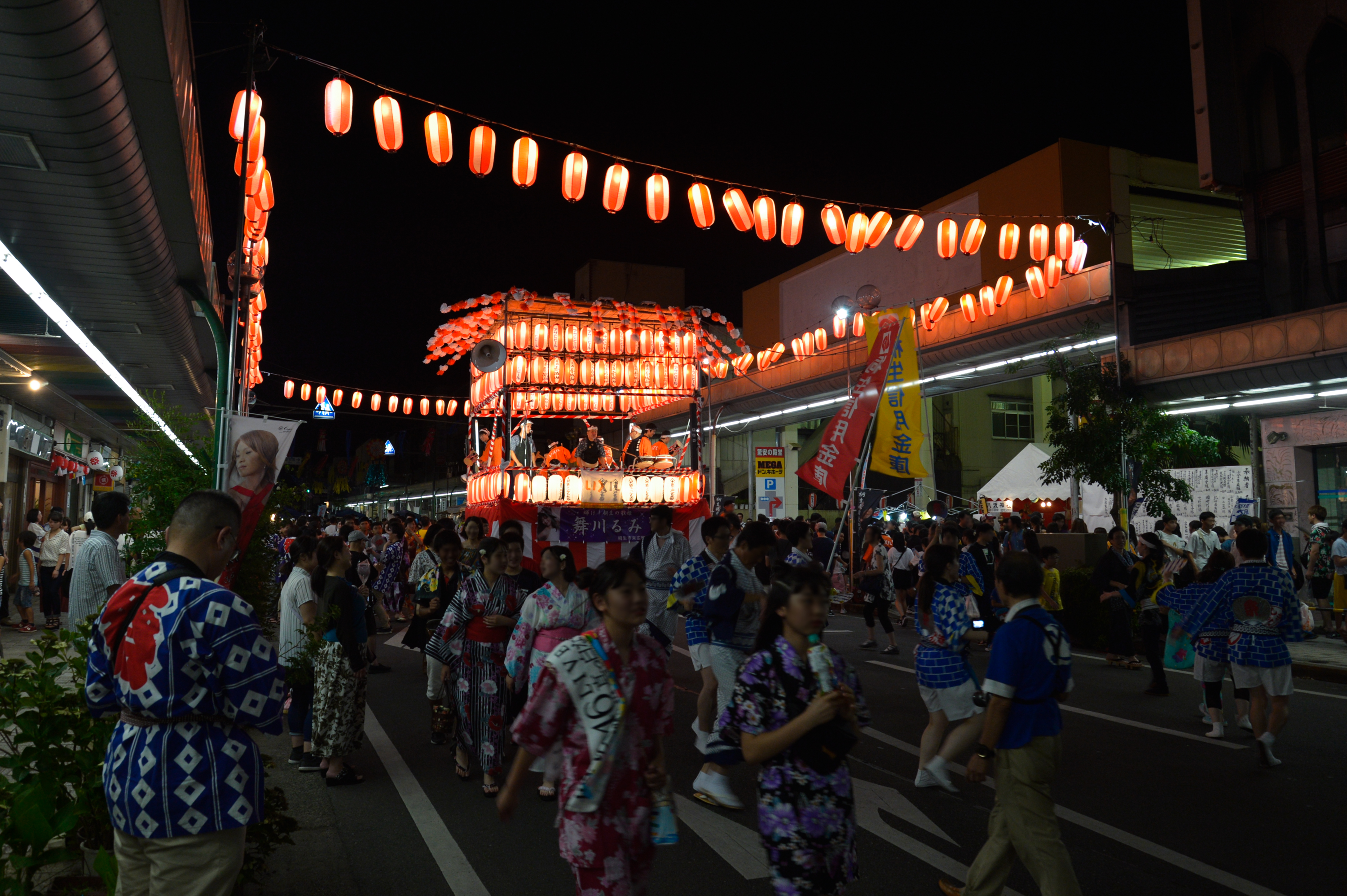 桐生八木節まつりの歩行者天国の様子